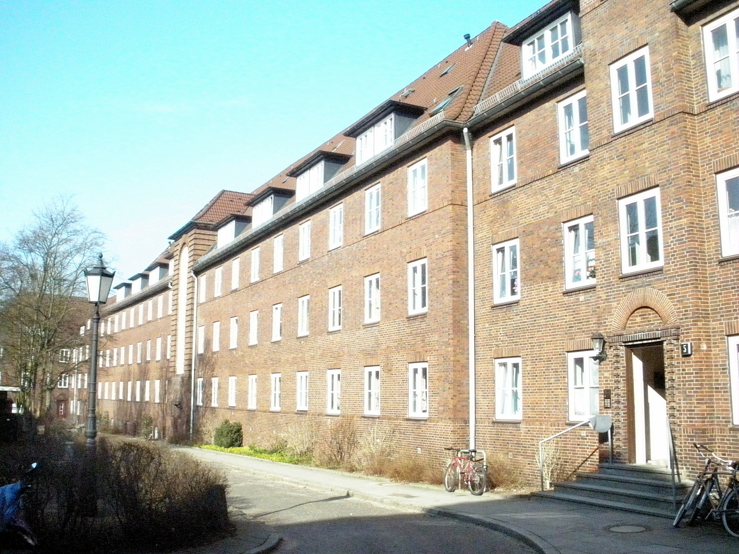 Siedlung Dulsberg Memeler Straße This is a photograph of an architectural monument.